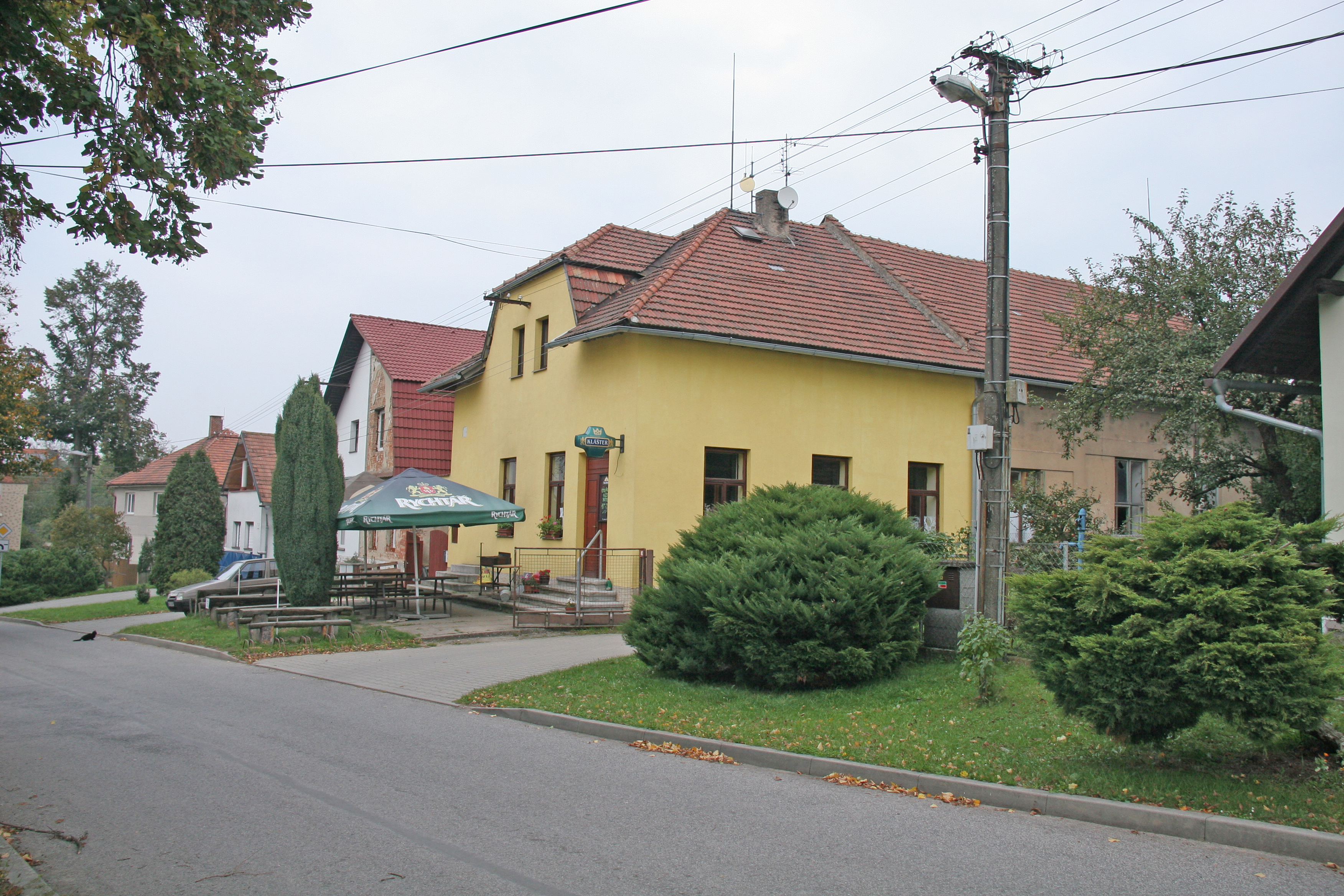 Hoděšovice hospoda